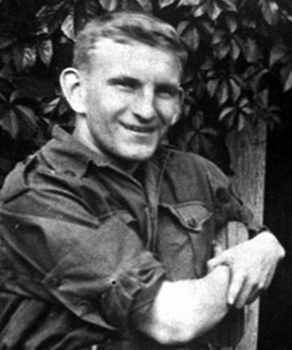 Роман Шухевич на Волині. Фрагмент світлини.